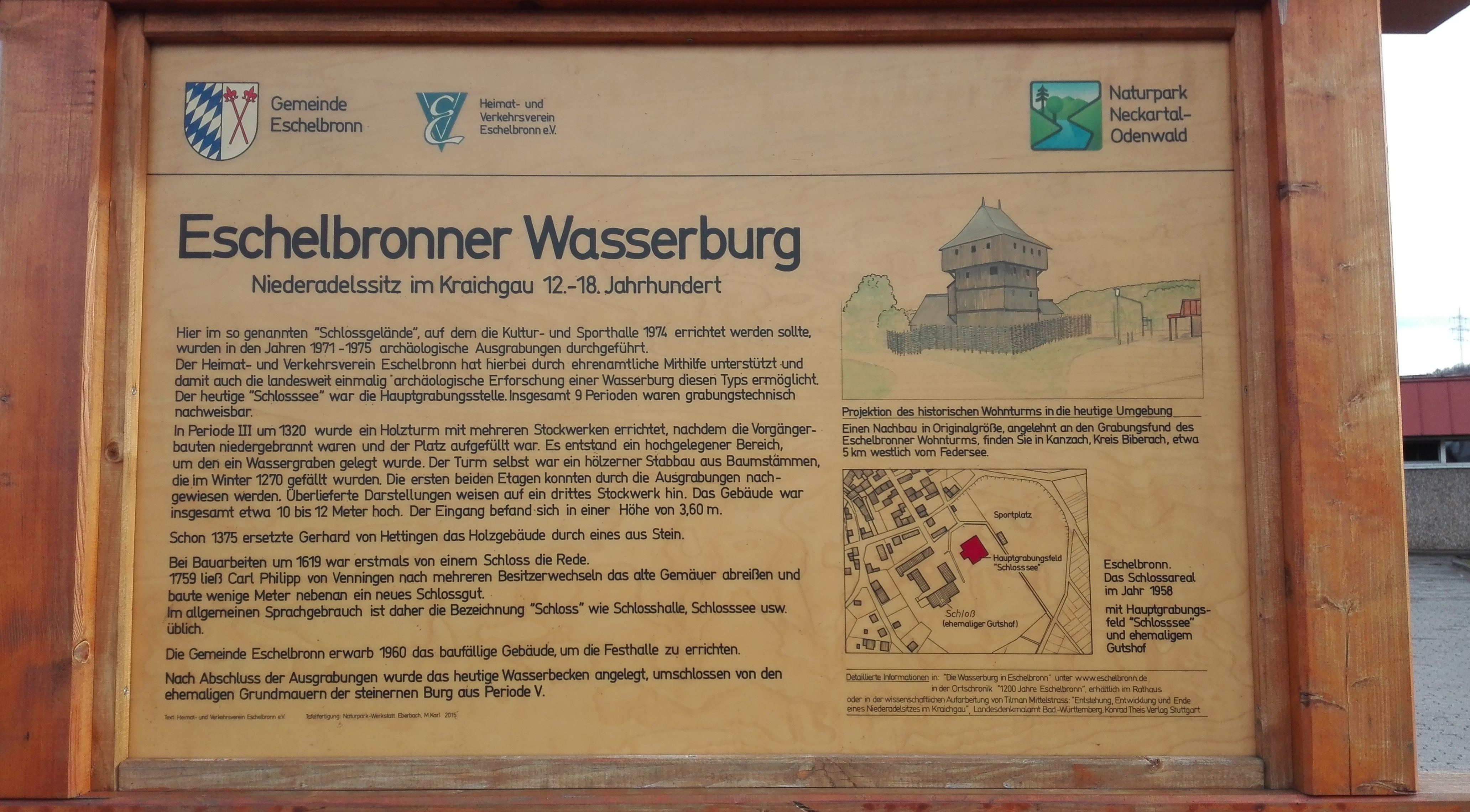 Kabel für den Breitbandausbau in Eschelbronn